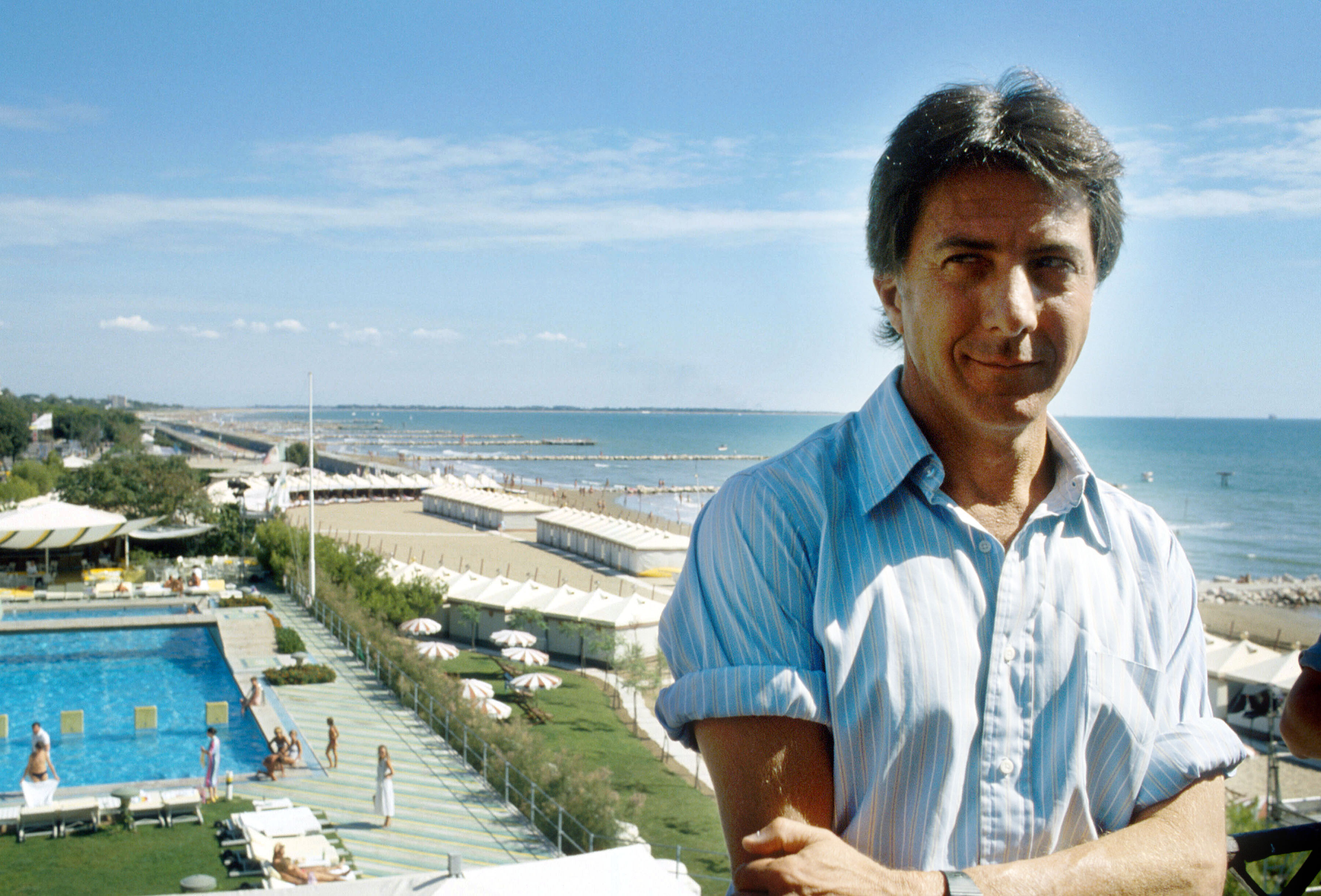 L'attore americano Dustin Hoffman alla Mostra del cinema di Venezia del 1984